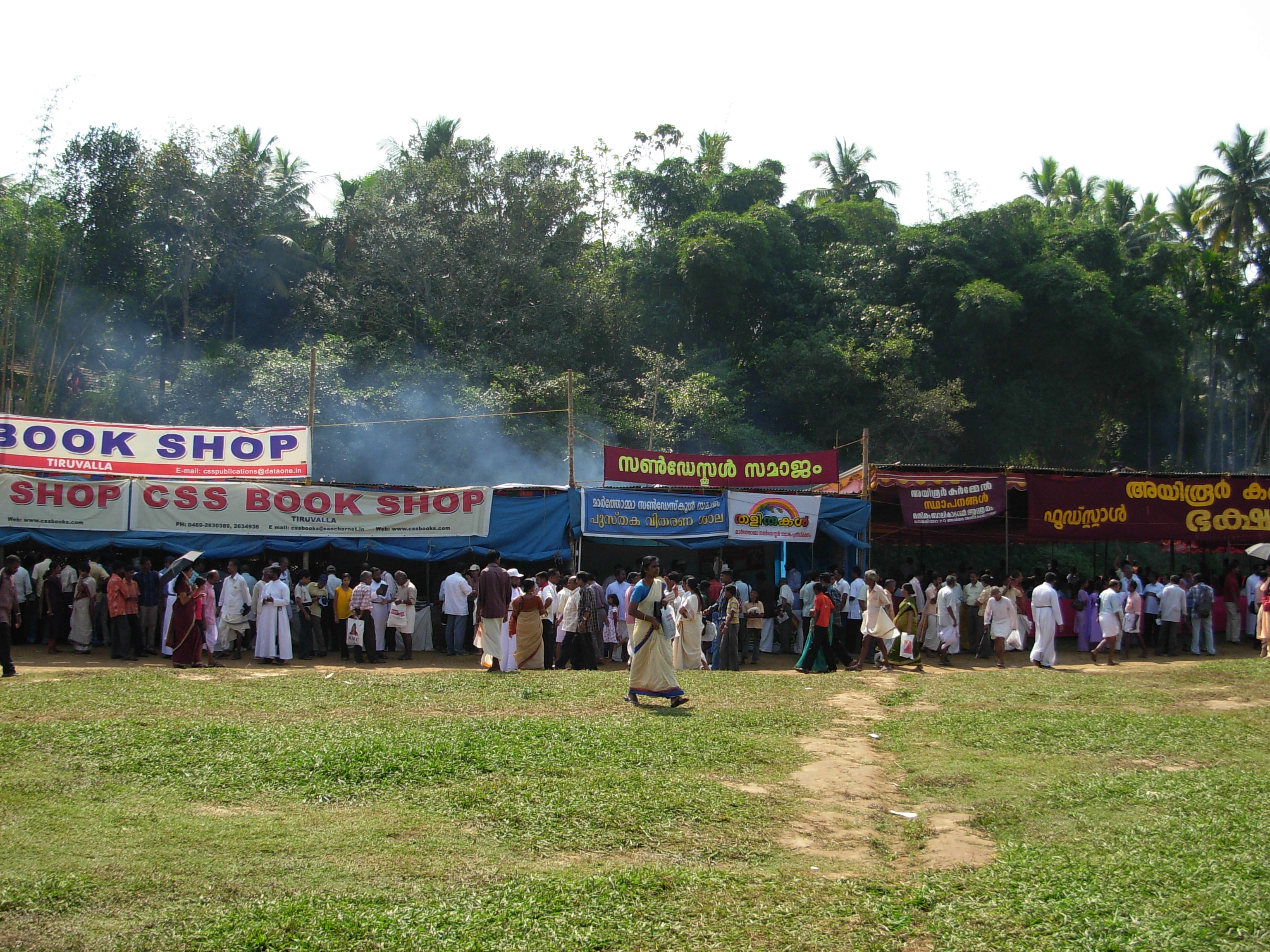 മാരാമണ്ണിലെ സ്റ്റാളുകൾ